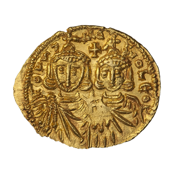 Солид. Константин V Копроним, совместное правление со Львом IV. Ок. 751—755 гг. (аверс). Погрудные портреты Константина V с короткой бородой, слева, и Льва IV без бороды, справа, в коронах и хламидах, между головами — крест.